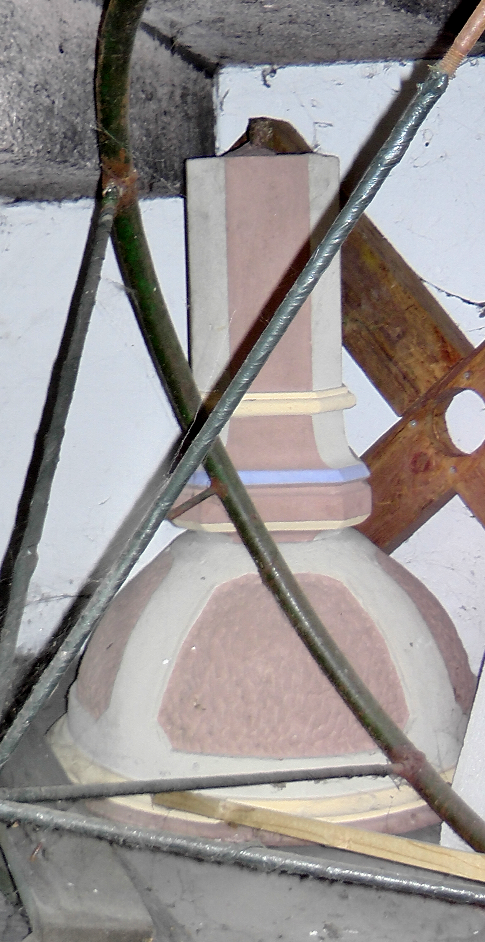 Evangelische Kirche Konz-Karthaus - Taugstein aus der originalen Ausstattung der Kirche